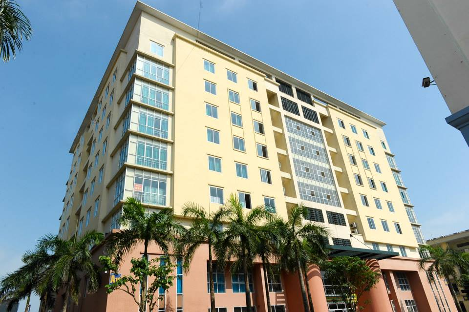 Đây là tòa nhà đào tạo kỹ thuật được xây dựng với sự hợp tác của Đại học Công nghiệp Hà Nội và tập đoàn Hồng Hải.